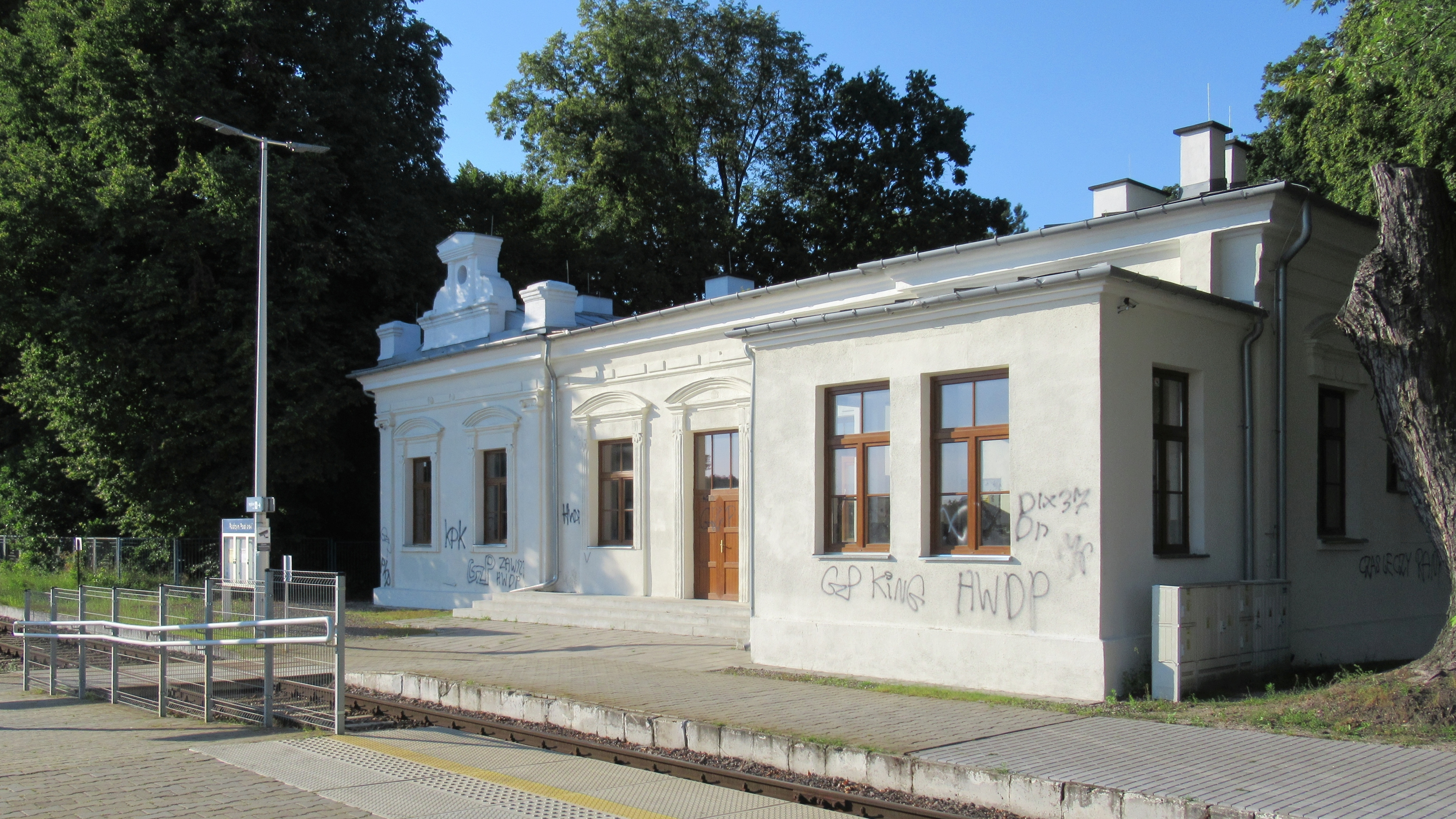 Bedlno Radzyńskie (pow. radzyński, woj. lubelskie, Polska). Stacja „Radzyń Podlaski”. Nieużywany budynek dworca.